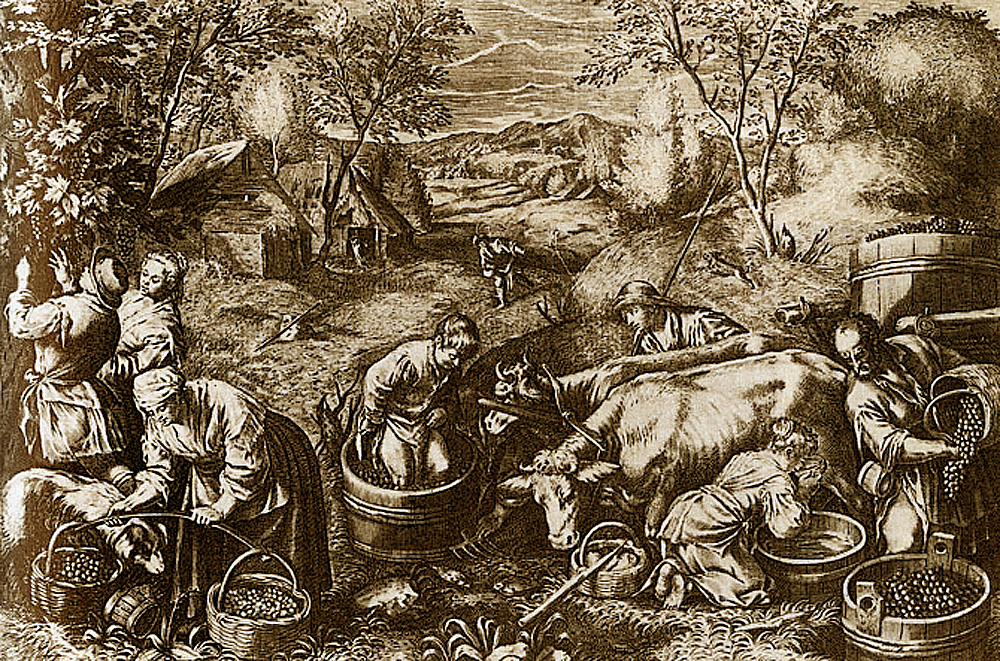 Vendanges de vignes accrochées aux arbres par Jacques Callot